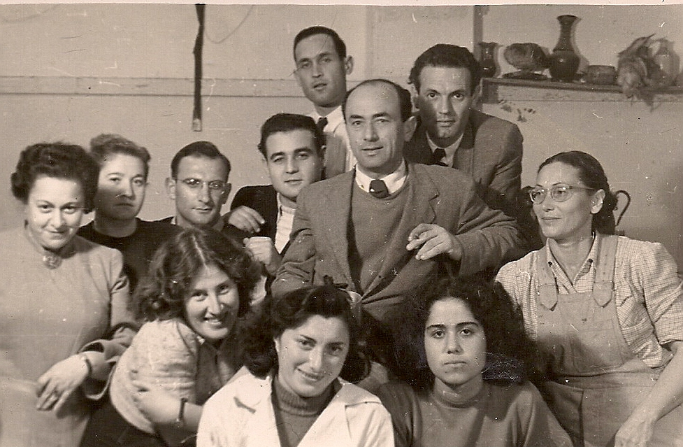 שטרנשוס ותלמידיו בסטודיה: שטרנשוס במרכז, רות צרפתי בשורה הראשונה , שלישית משמאל